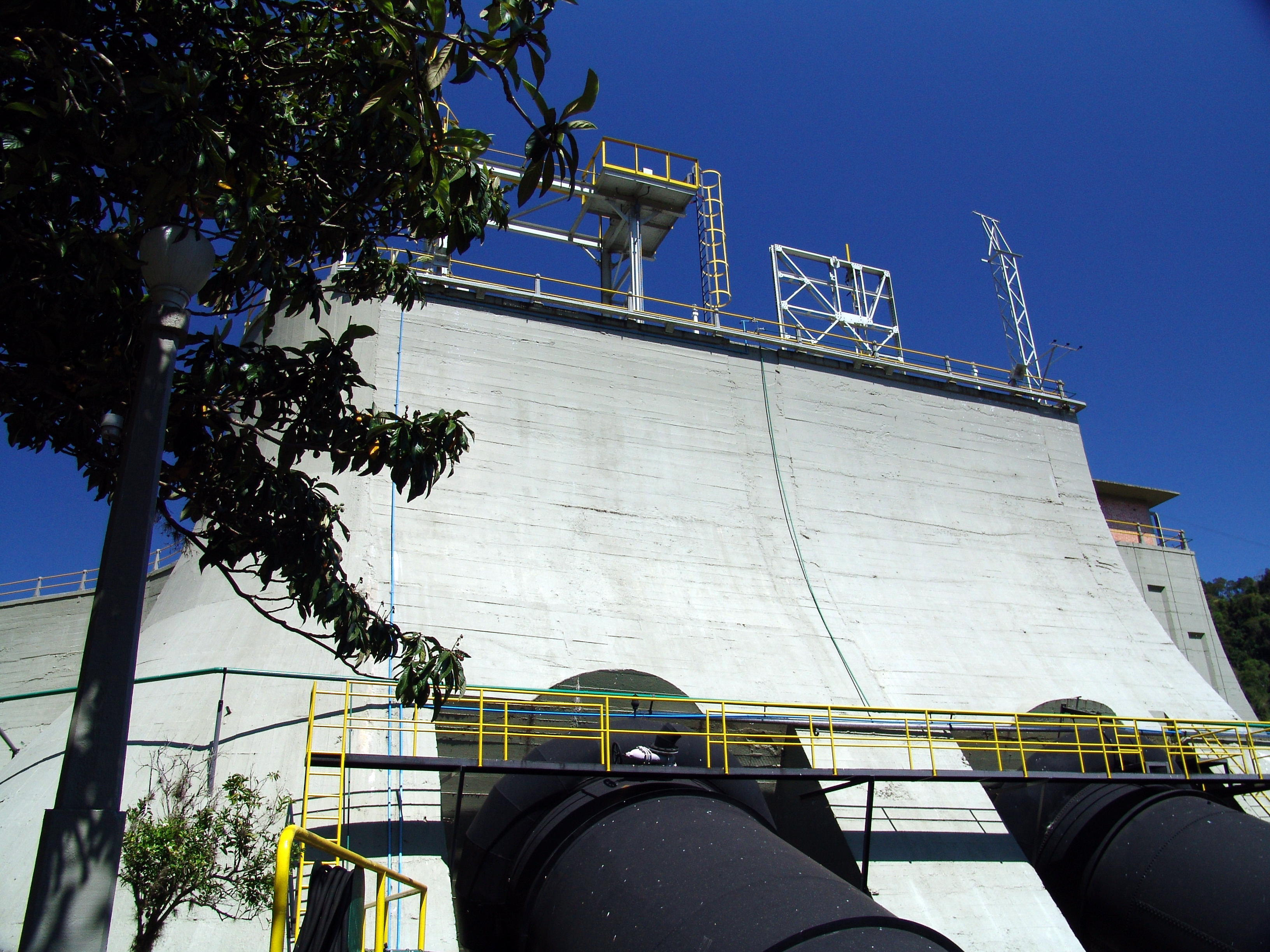 Foto da Barragem da Usina Getúlio Vargas, Paraná